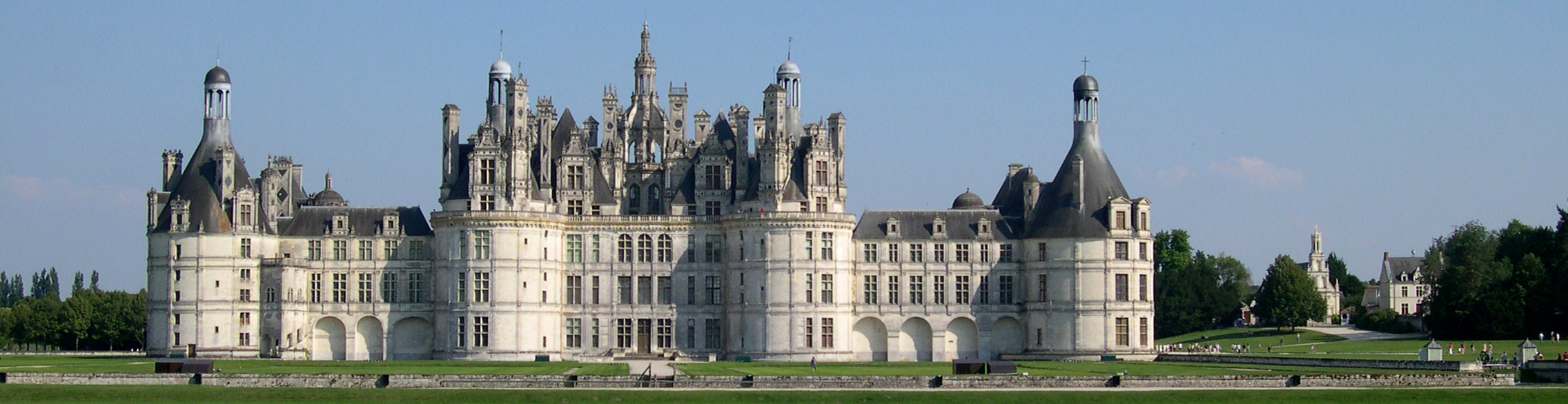 France Loir-et-Cher Château de Chambord Photographie prise par GIRAUD Patrick